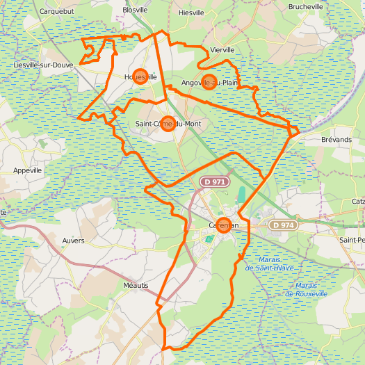 Carte de Carentan-les-Marais , commune nouvelle